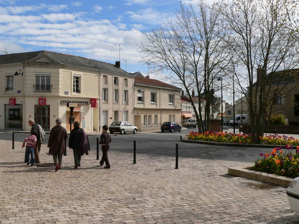 Le May-sur-Èvre - Bourg.